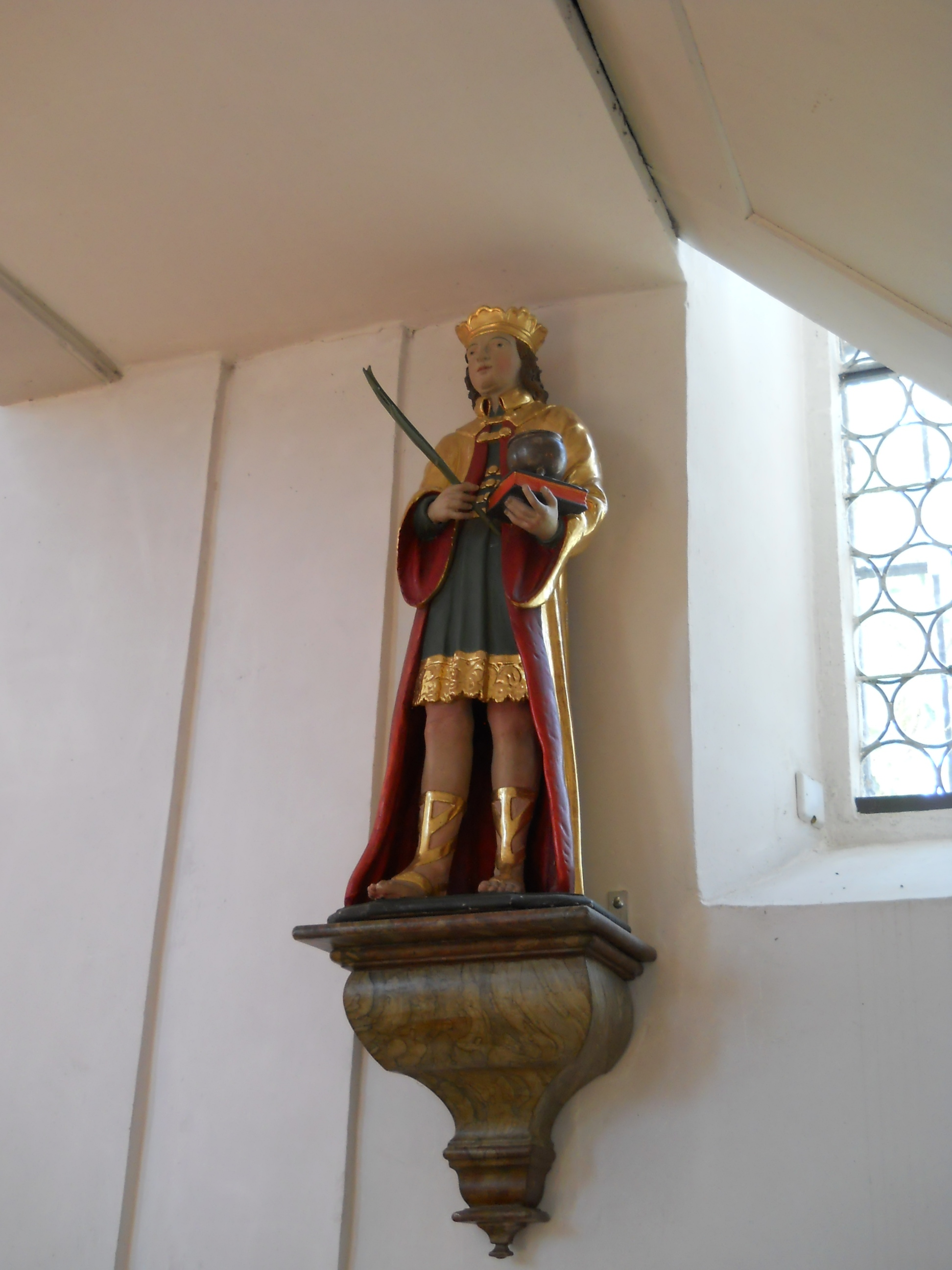 St. Veit, Ortsteil von Pleinfeld im Landkreis Weißenburg-Gunzenhausen (Bayern), Kath. Pfarrkirche St. Vitus, Figur des Kirchenpatrons aus dem frühen 17. Jahrhundert